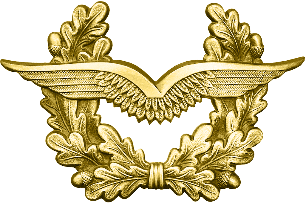 Abzeichen für die Dienstmütze der Bundeswehr für Generale der Luftwaffe Beschreibung: Doppelschwinge mit Eichenlaubumrandung Mützenfarbe: blaugrau Trageweise: Über der Mitte des Mützenschirms, Unterkante des Abzeichens über dem Kinnband. Maße: Breit: 75 mm Hoch: 45mm Ausführung: goldfarben, Metall